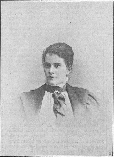 Anna Möller, Sveriges första kvinnliga gesäll.